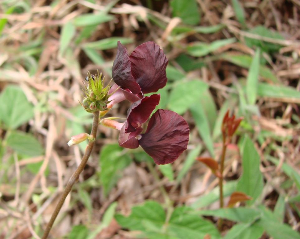 Macroptilium atropurpureum - FABACEAE Parque Olhos d'Água - Brasília - Distrito Federal - Brasil.